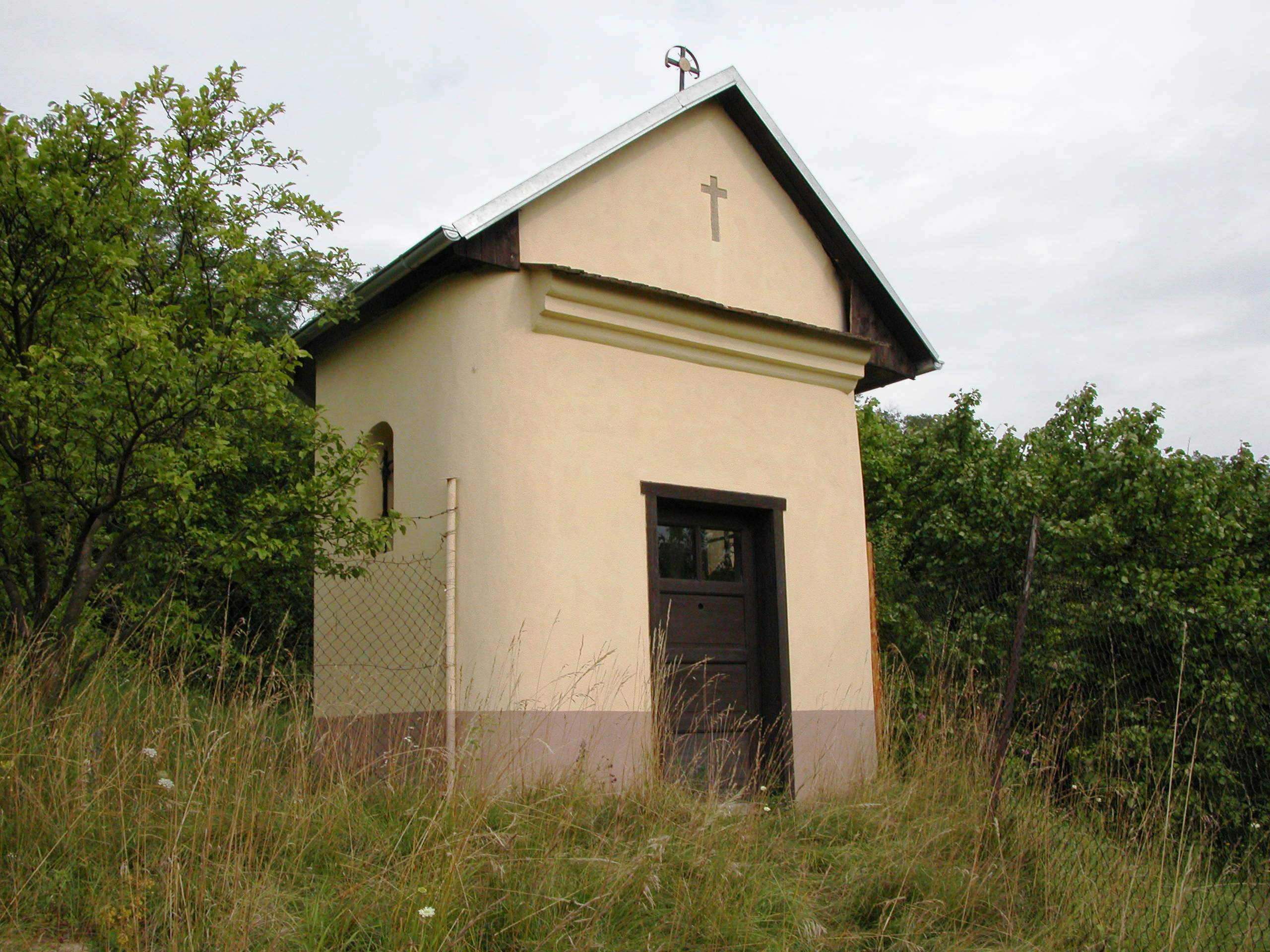 Kaplička sv. Šebestiána (Seloutky), nad obcí, trať Ve vinohradech, Seloutky